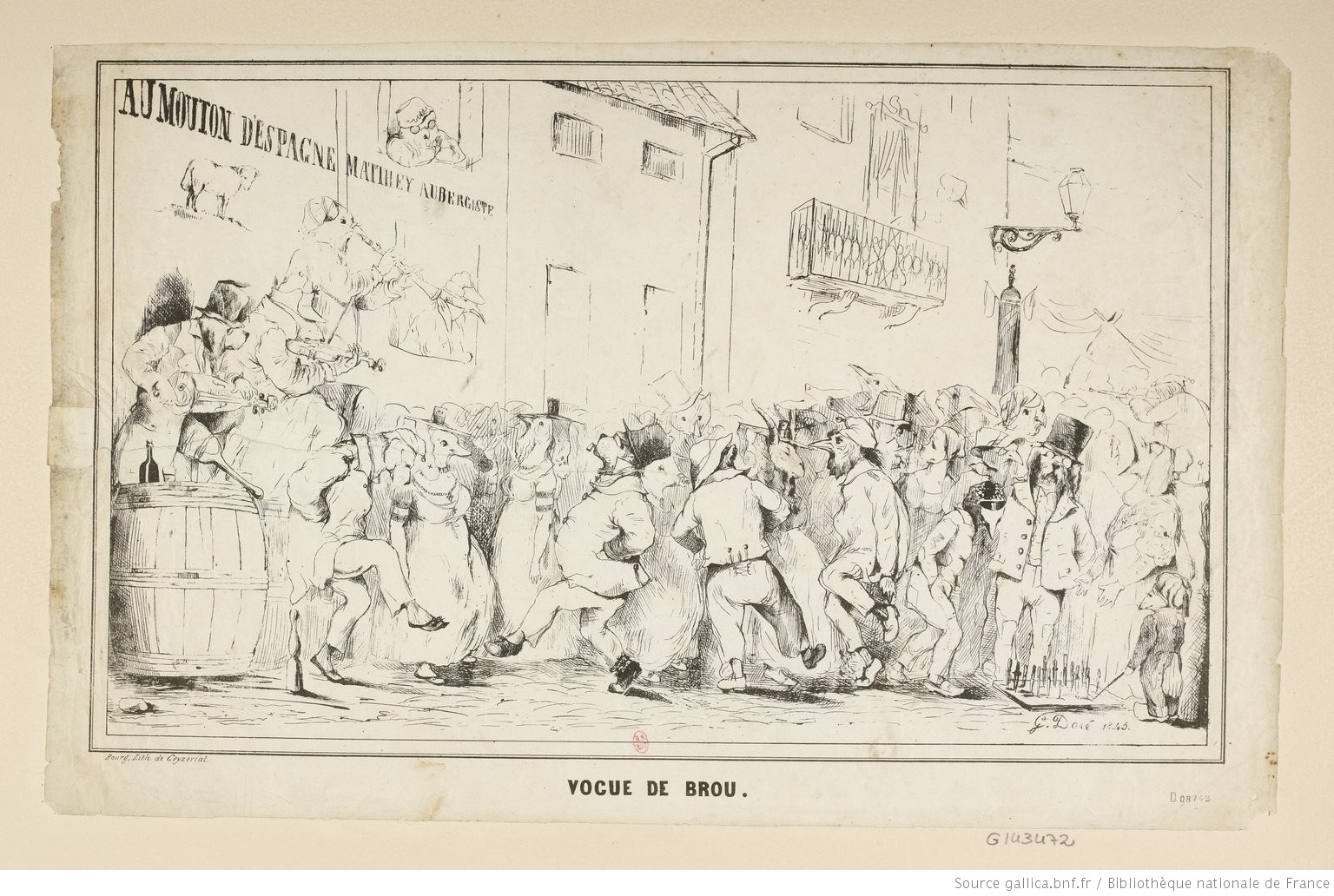 Vogue de Brou par Gustave Doré (1845) lithographie ; 20,4 x 33,1 cm Appartient à : [Recueil. Oeuvre de Gustave Doré. Oeuvre monté. Tome 29, Eaux-fortes ; lithographies (I)]